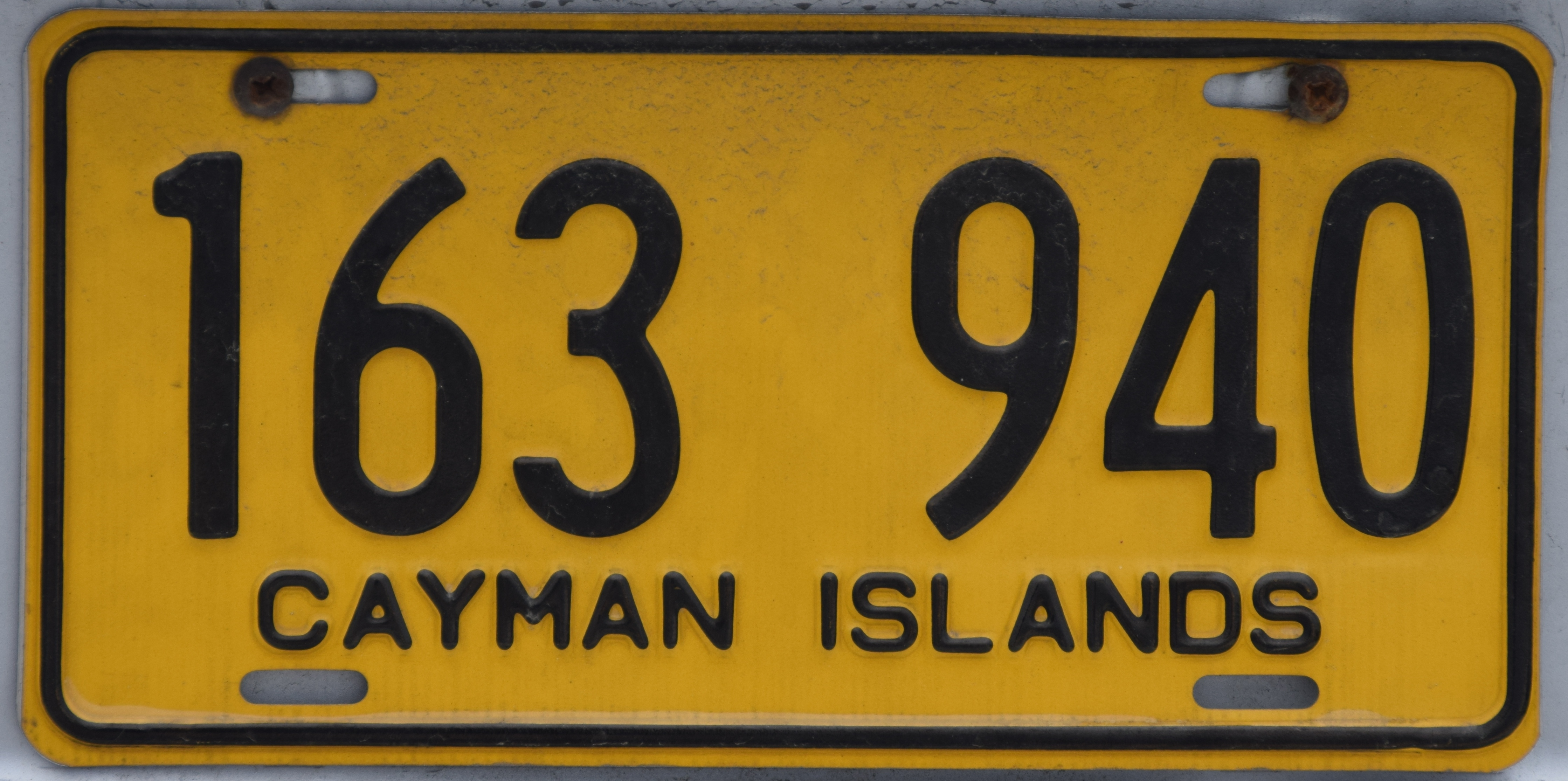 kenteken plaat van de Cayman Islands